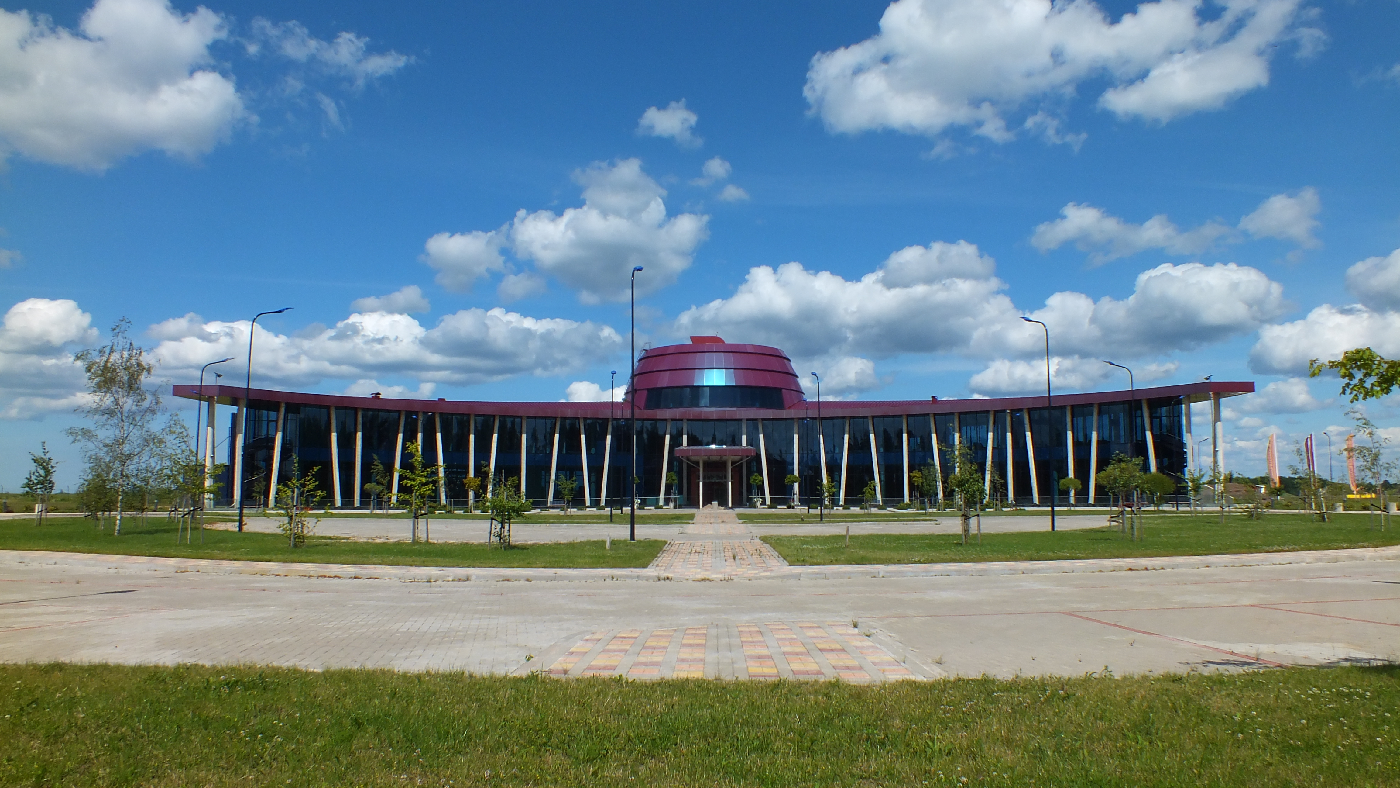 Jūrmalas lidostas terminālis (centrs)